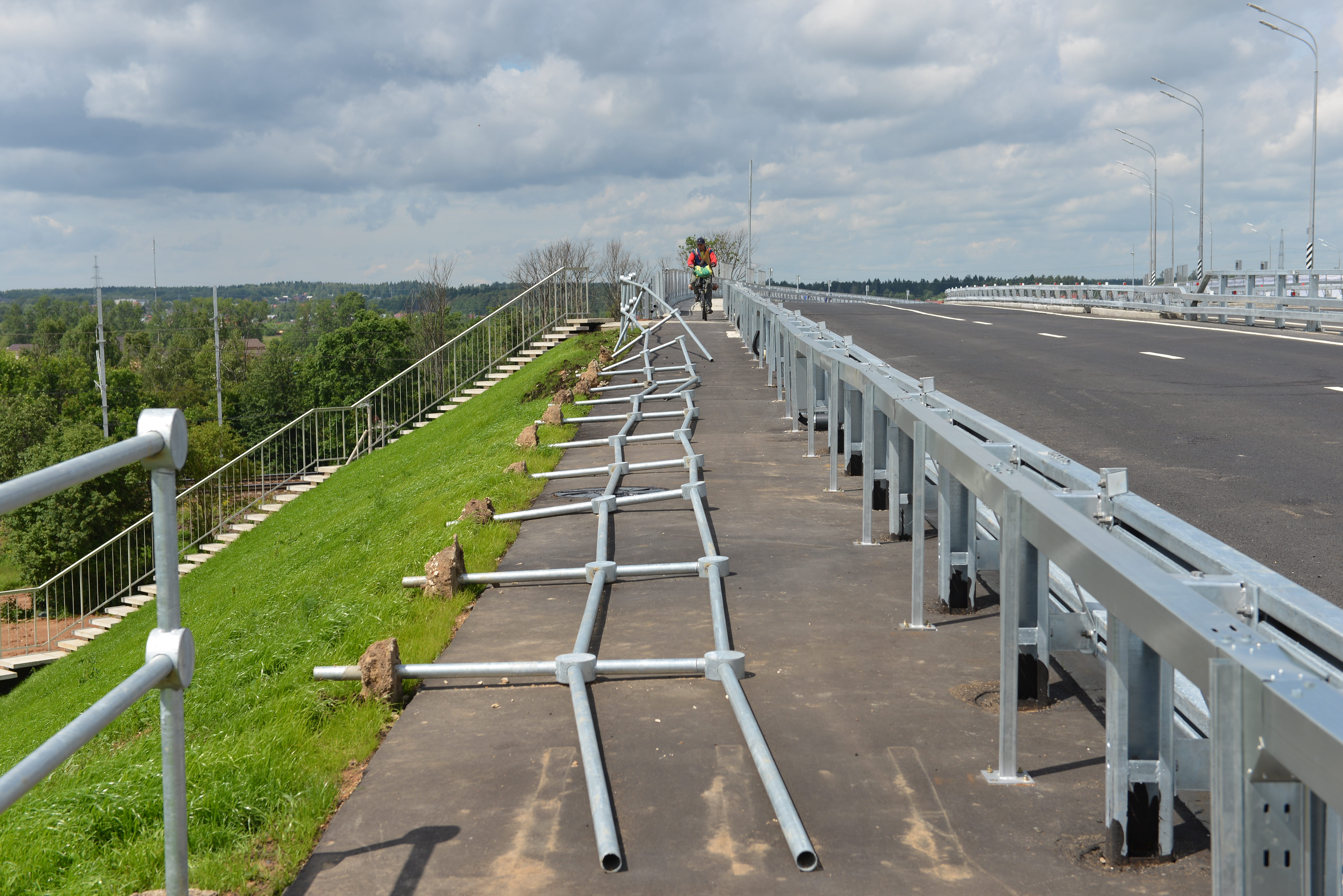 Упавшее ограждение принятого в эксплуатацию день назад путепровода через Киевское направление железной дороги в Кокошкино города Москвы